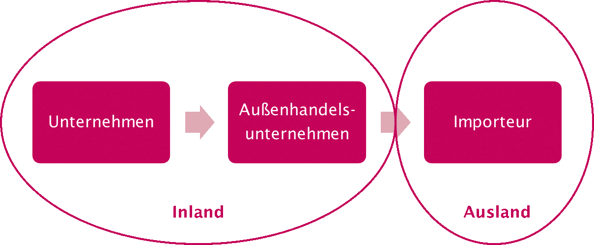 Der direkte Export (Markteintrittsstrategie)